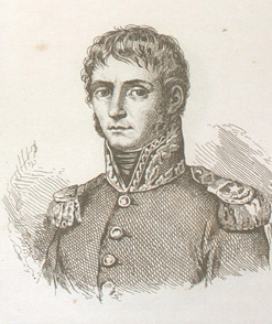 Illustration of French General Charles Leclerc (1772-1802). Published in: Hugo, Abel (1838). France militaire: histoire des armées françaises de terre et de mer de 1792 à 1837. Paris: Delloye, vol. 3, opp. p. 221. OCLC 27370001